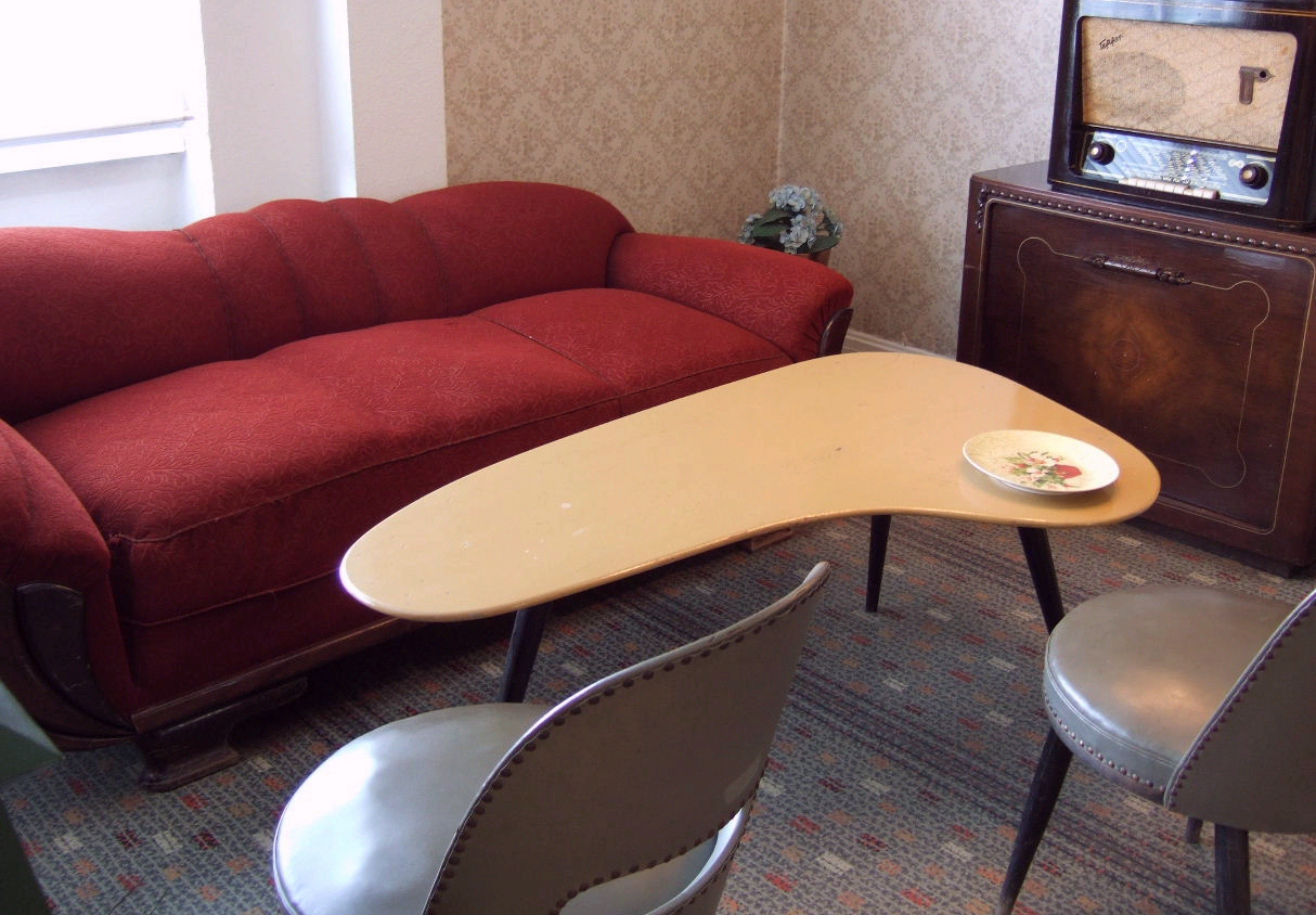 Wohnzimmer mit Nierentisch Ausstellungsstück im Museum der Stadt Gladbeck (Schloss Wittringen) Aufnahme: 17.4.2006 Url